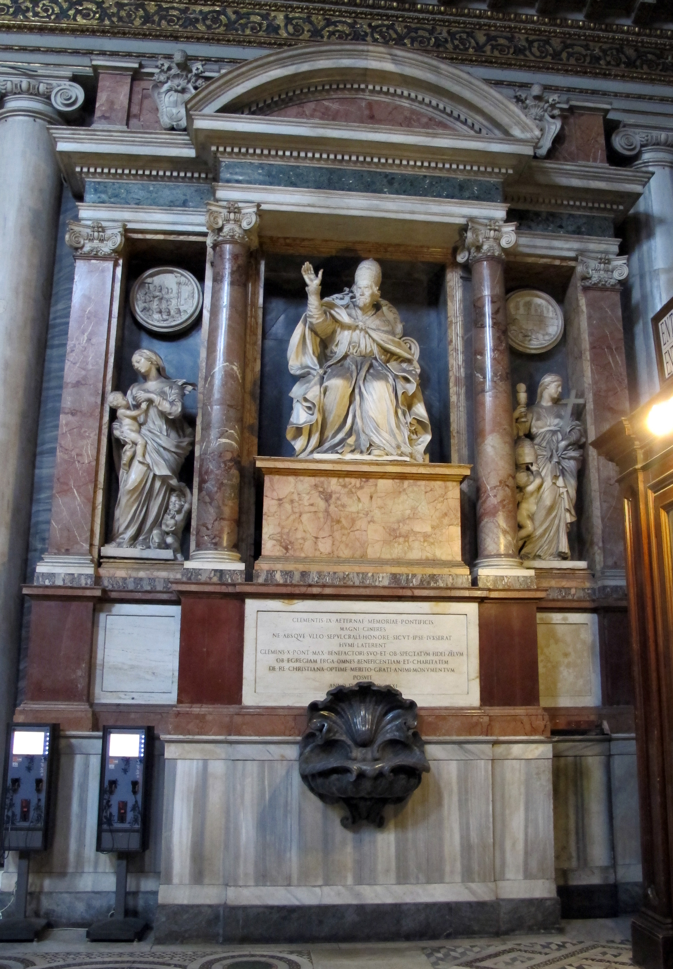 Santa Maria Maggiore (Roma)